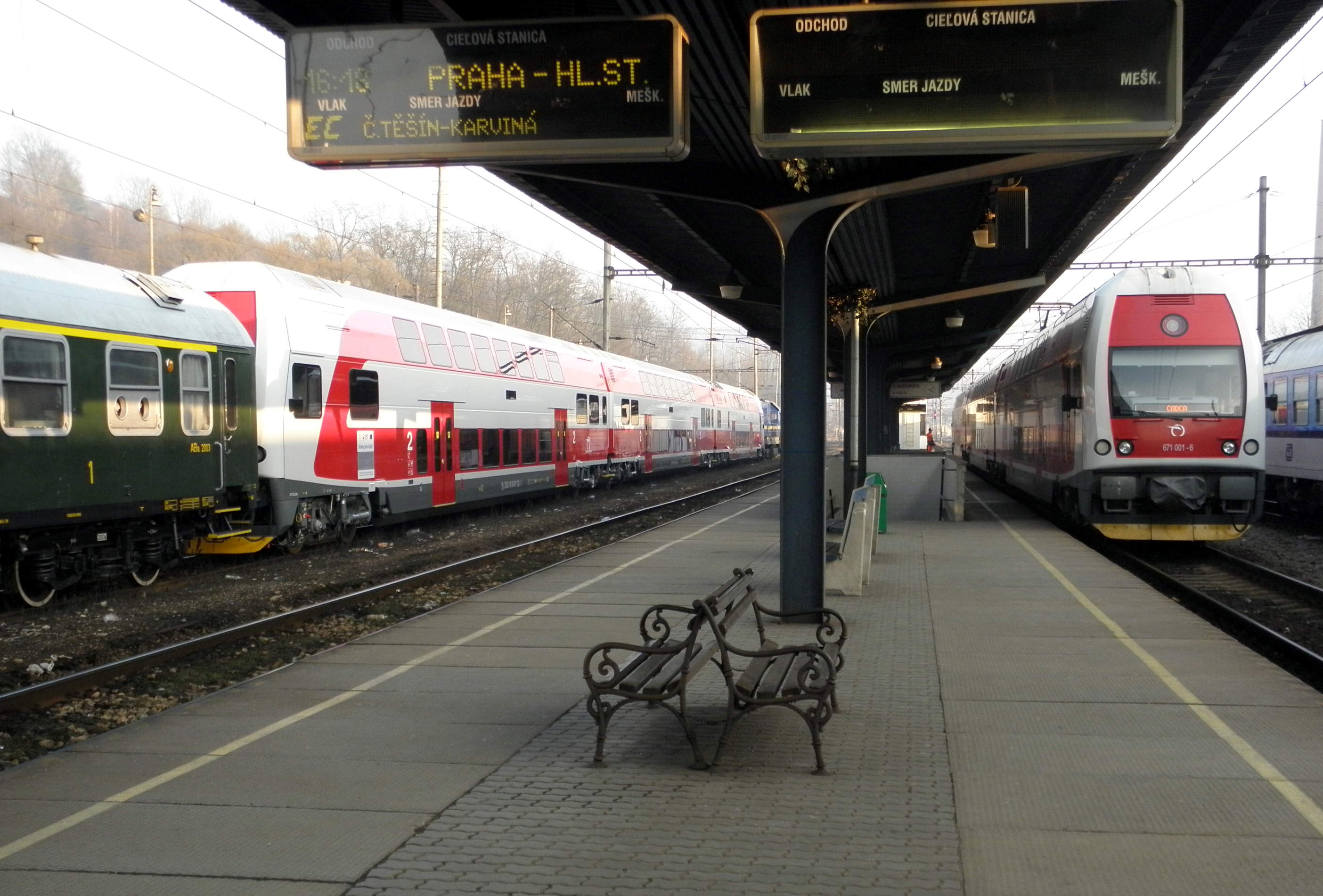 Nová 671.002 ZSSK jede do domovského depa Žilina a v Čadci se setkává s 671.001